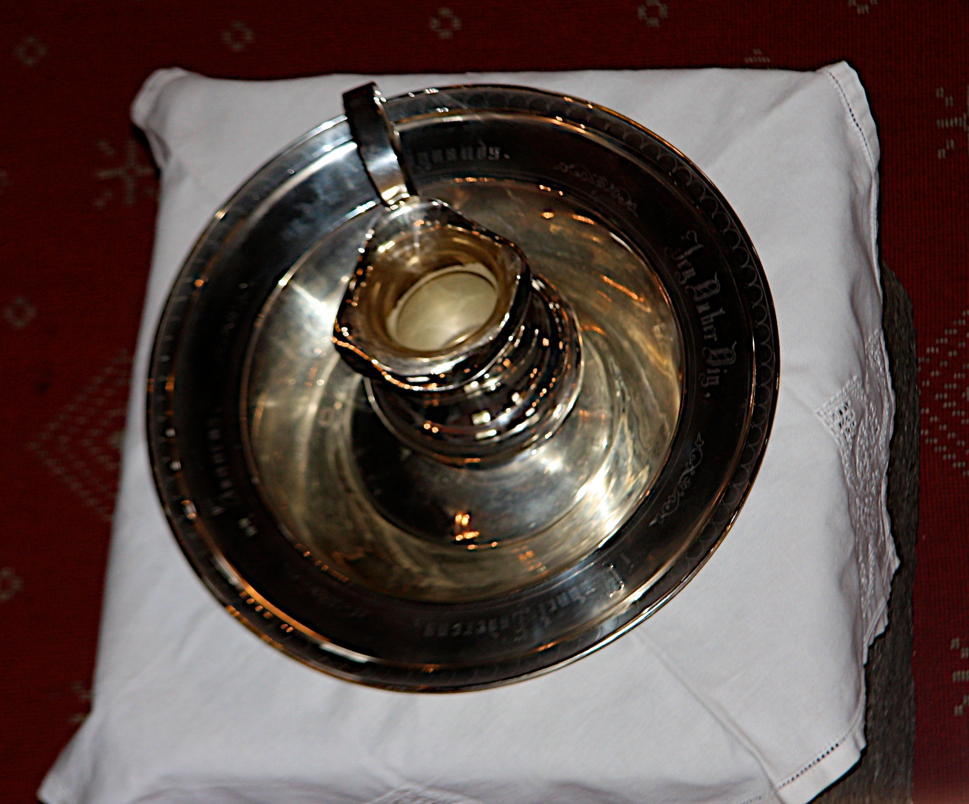 Døpefonten i Gulen kirke